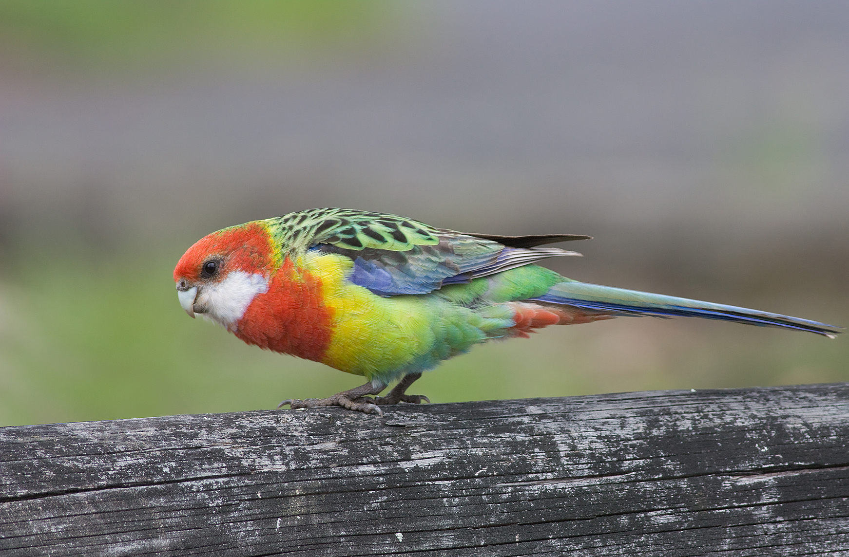 1.2 only